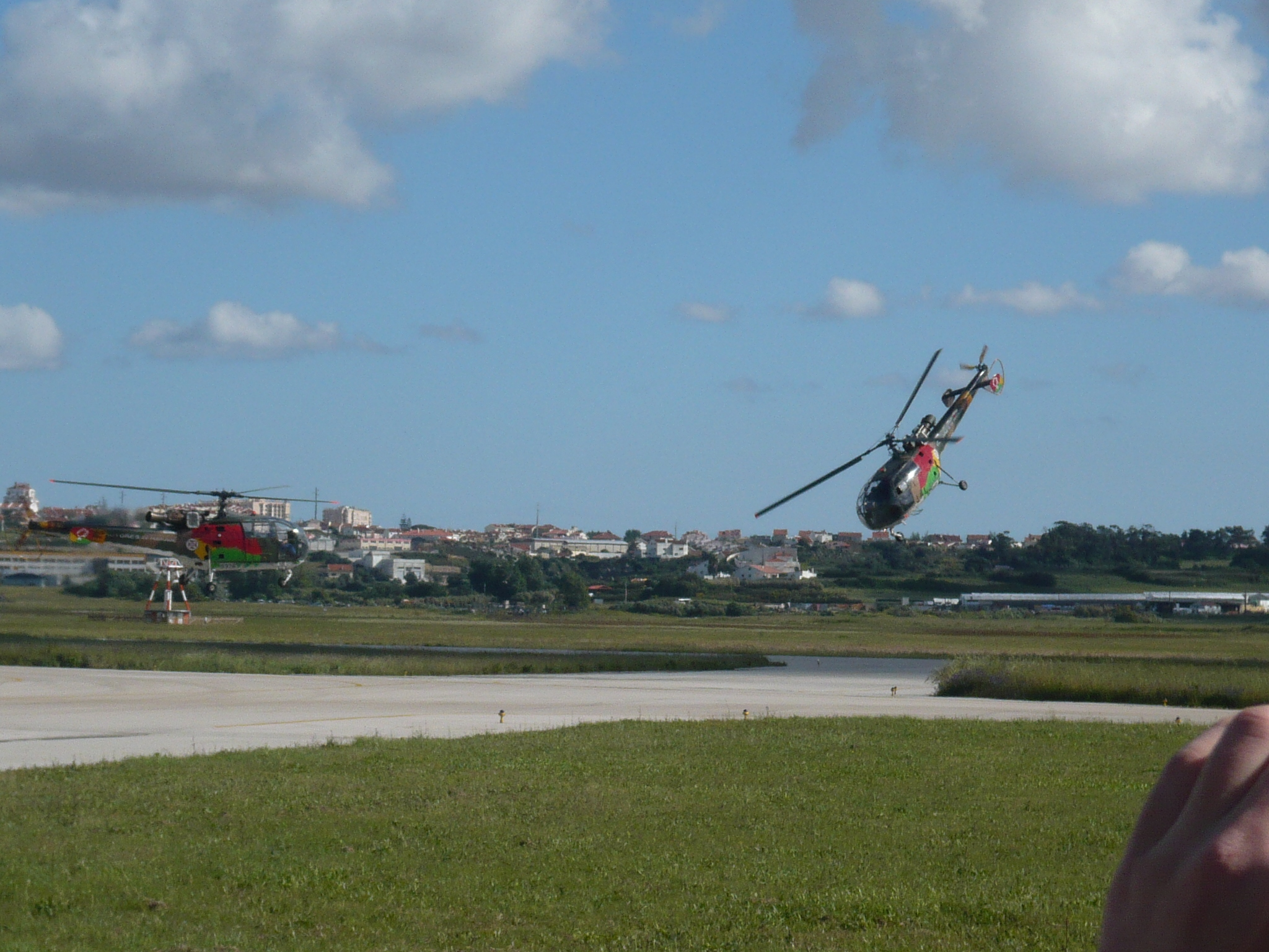 Rotores de Portugal no AeroNostalgia2008. Espetáculo aéreo promovido pela Aero Fénix, Museu do Ar e TAP, na Base Aérea de Sintra.